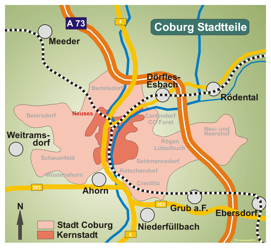 Karte von Coburg, Stadtteil Neuses